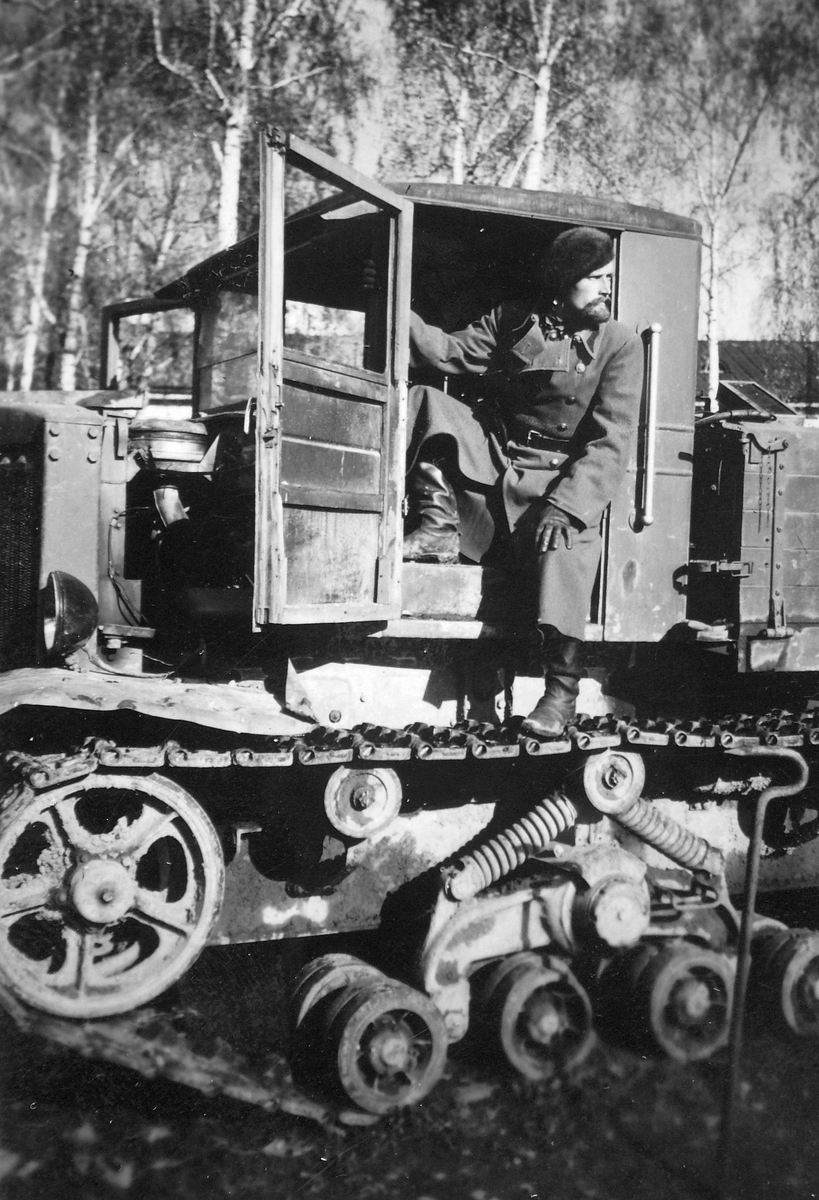 II. utászzászlóalj Bobor nevű tiszthelyettese egy Vorosilovec traktorral. Location: Ukraine Tags: second World War, Soviet brand, eastern front Title: II. utászzászlóalj Bobor nevű tiszthelyettese egy Vorosilovec traktorral.